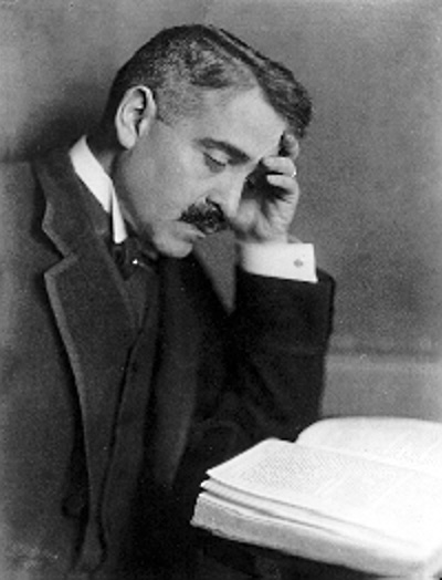 Aby Warburg, deutscher Kunsthistoriker,Foto